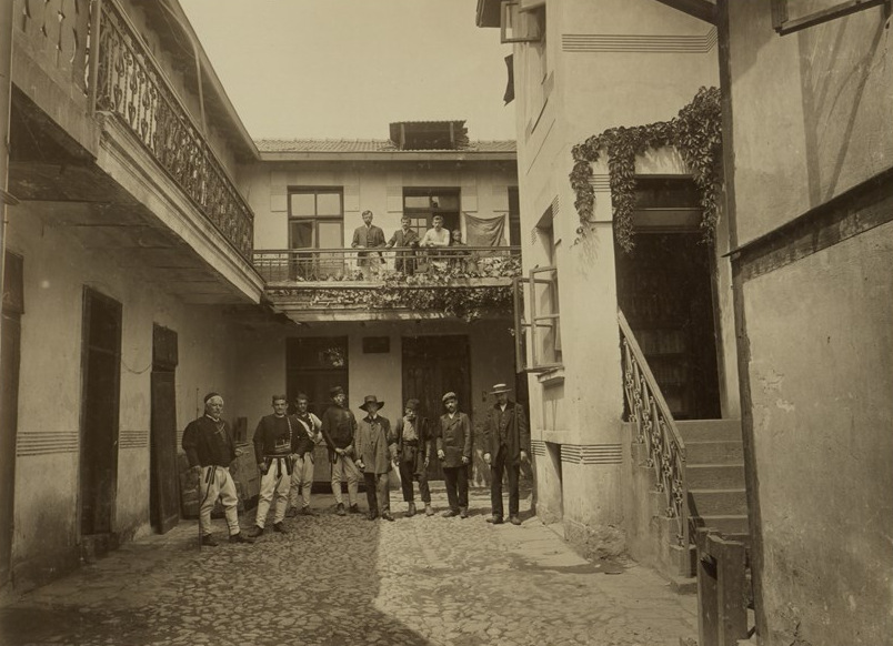 Първа българска фабрика за тахан и захарни изделия на Аврам М. Чальовски в София. Фотоалбум с фотографии на български индустриални предприятия от периода 1887-1912 г., подарен от Съюза на българските индустриалци на цар Фердинанд І по случай 25-годишнината от възшествието му на българския престол.